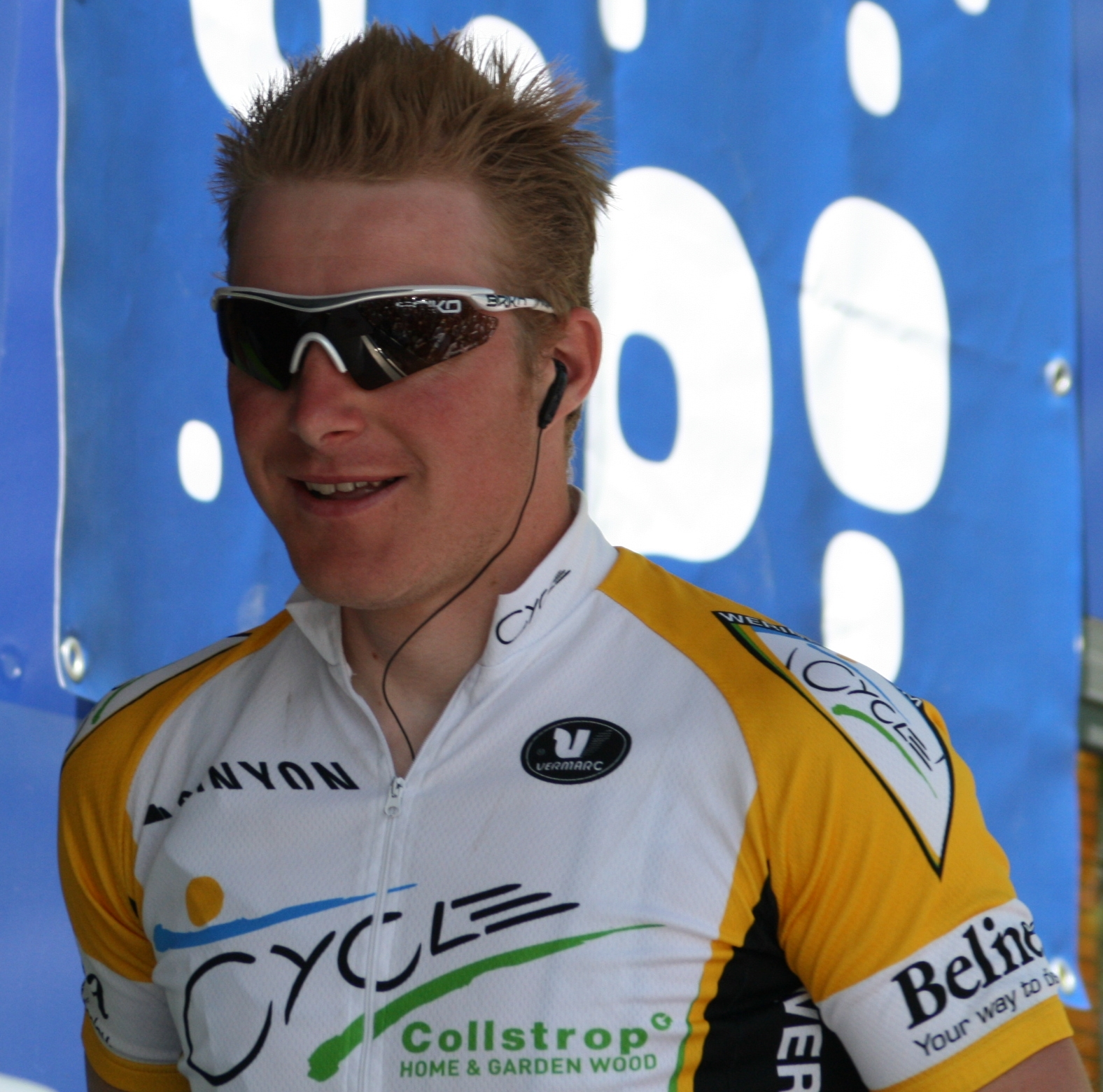 Matthé Pronk aux Quatre jours de Dunkerque 2008